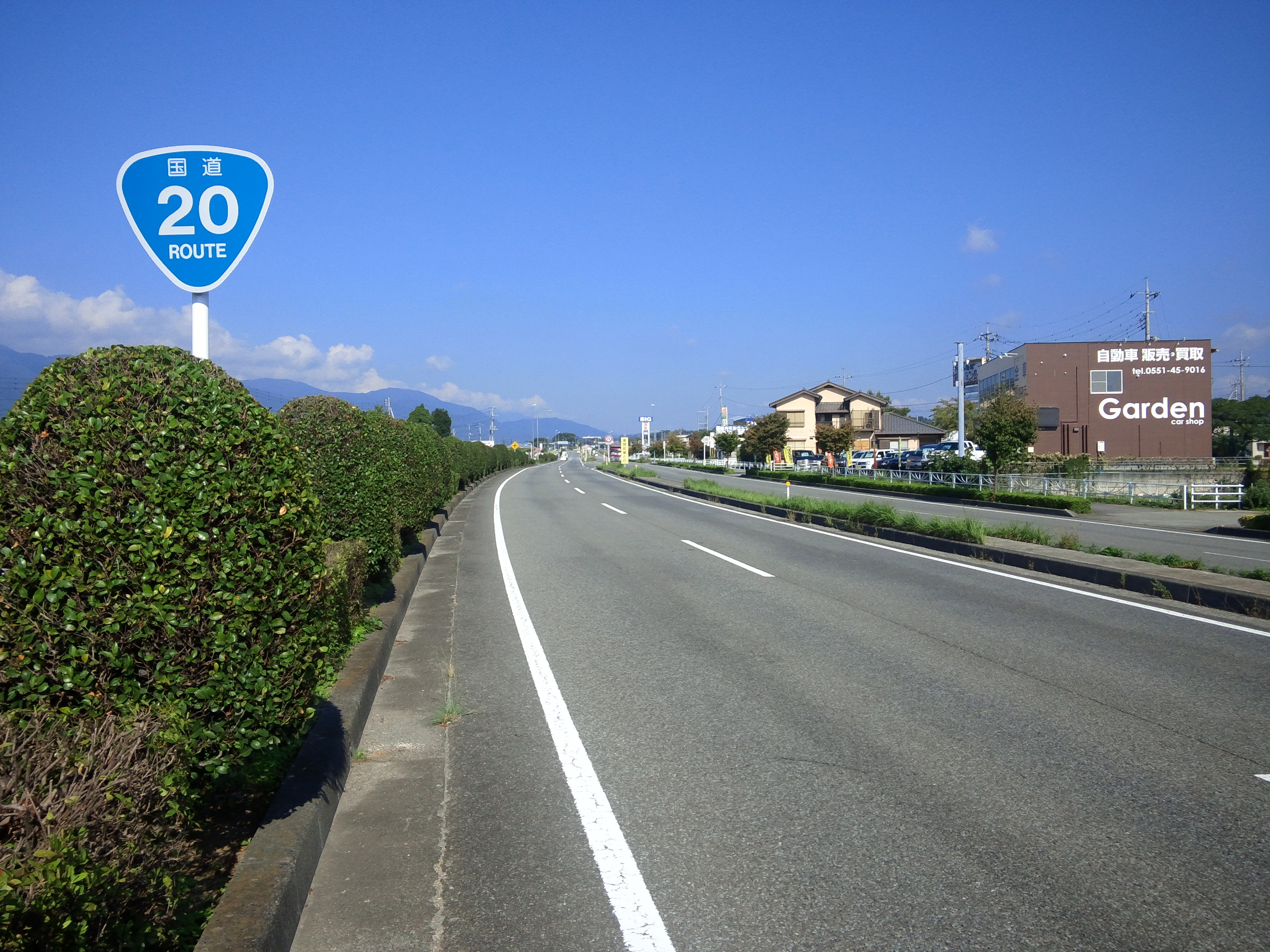 国道20号線(双葉バイパス）山梨県甲斐市志田付近（韮崎市方面を撮影）